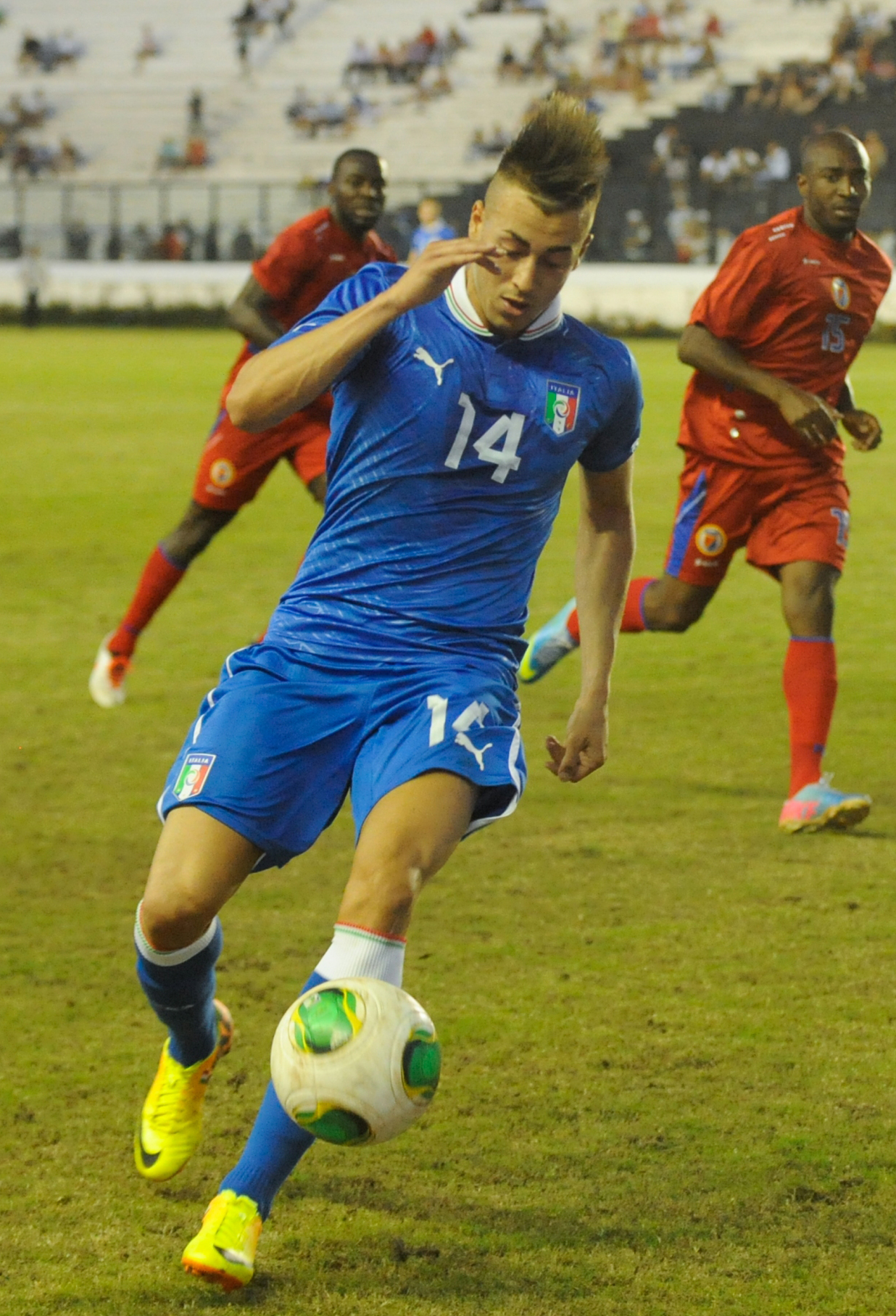 Stephan El Shaarawy durante l'amichevole tra le Nazionali di calcio di Italia e Haiti allo Stadio São Januário di Rio de Janeiro, 11 giugno 2013